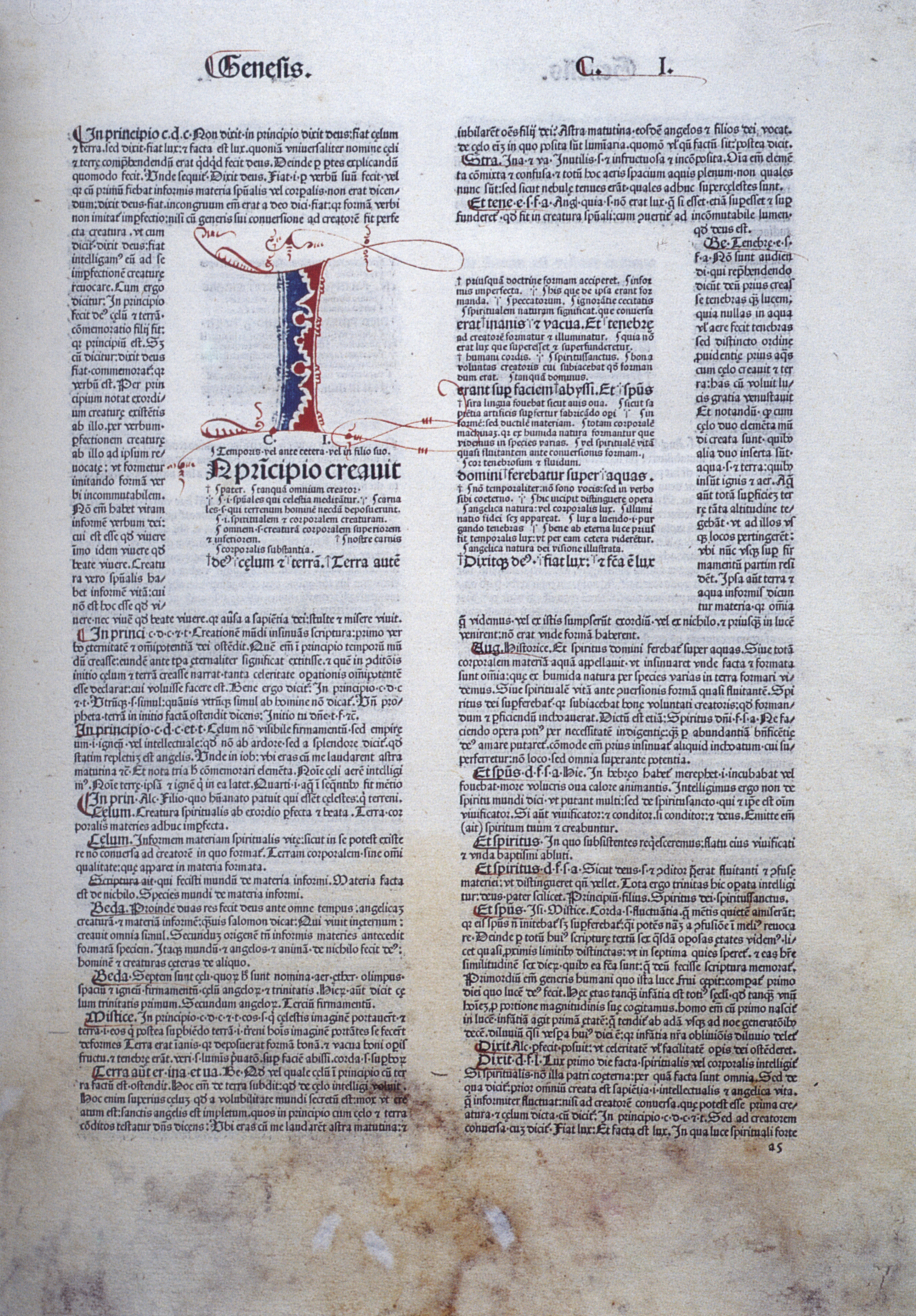 Genesis I aus "Biblia latina cum glossa ordinaria Walafridi Strabonis", gedruckt von Adolf Rusch in Straßburg 1481 für Anton Koberger in Nürnberg; Prädikantenbibliothek Isny, Theol 1